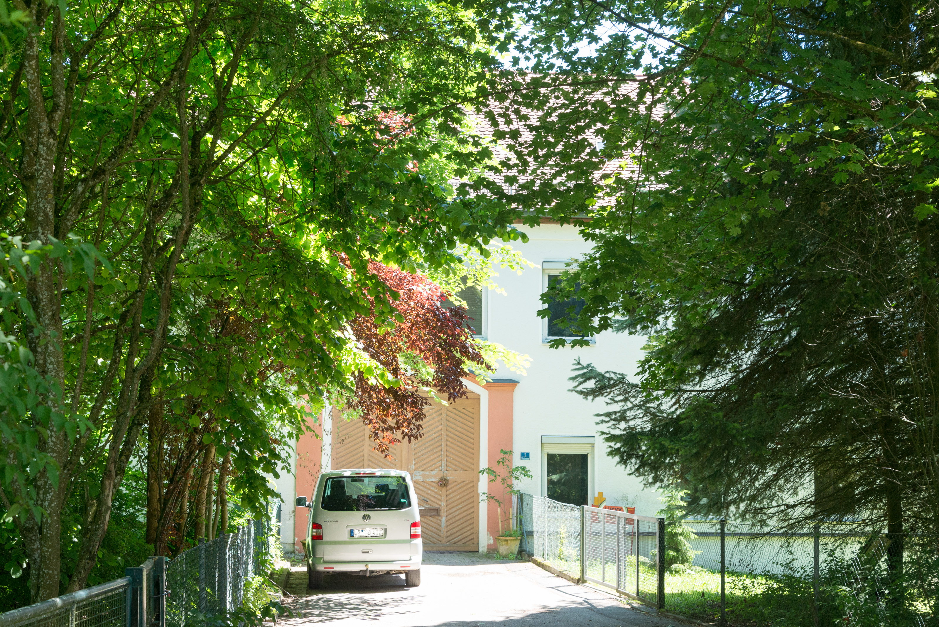 Ehemaliges Seyboldstorffsches Hofmarkschloss: Vierflügelanlage des späten 18. Jahrhundert, Ausbau der Anlage 1868, zweigeschossige, weitgehend ungegliederte Gebäude, ab 1951 Magdalenerinnenkloster, jetzt Privatbesitz. This is a photograph of an architectural monument.